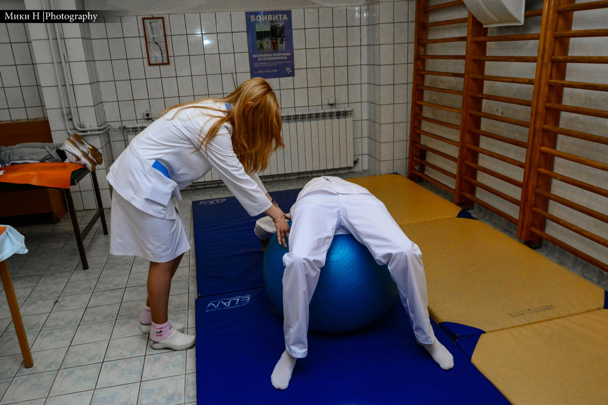 Физиотерапевт